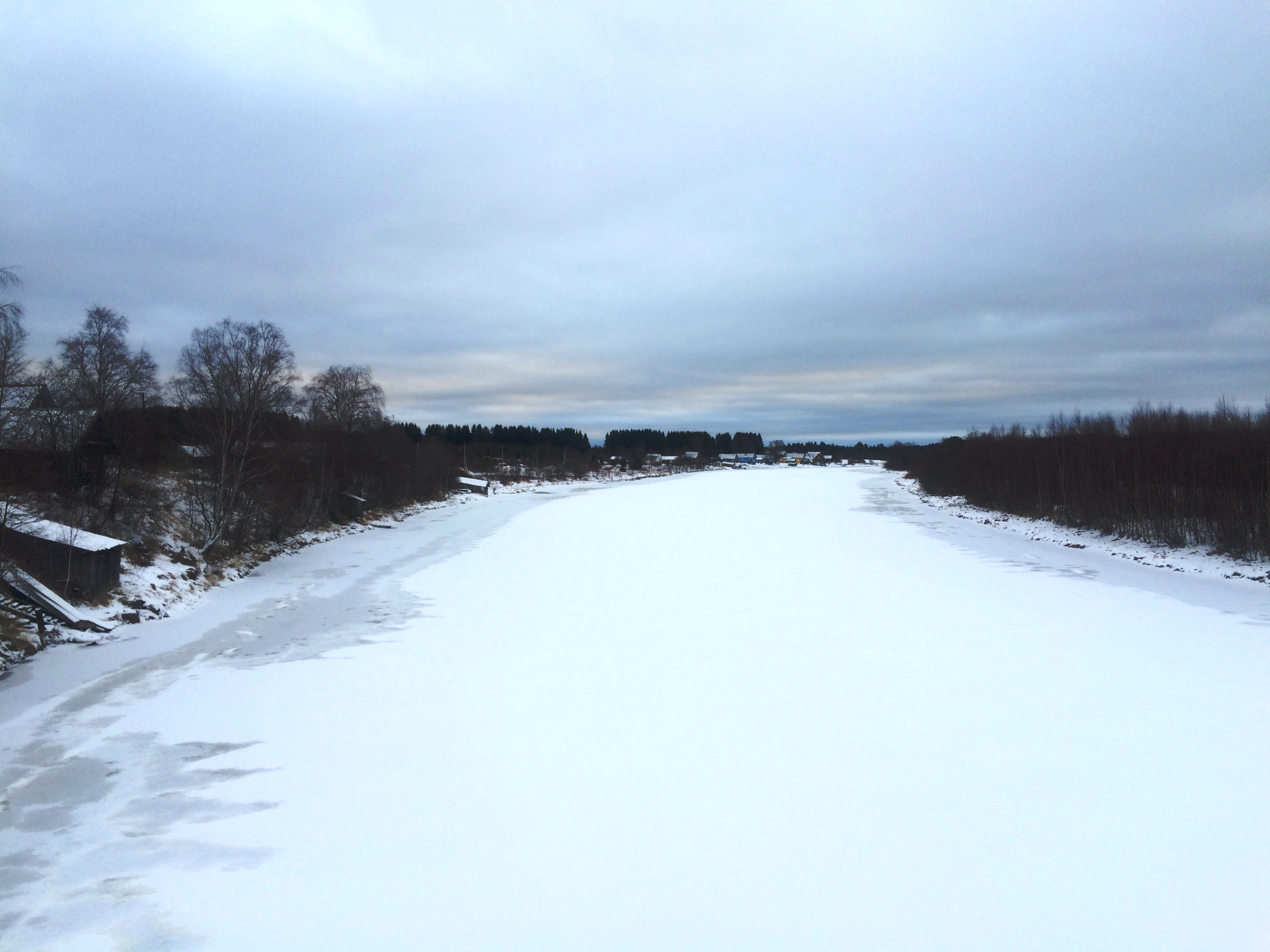 Тулокса